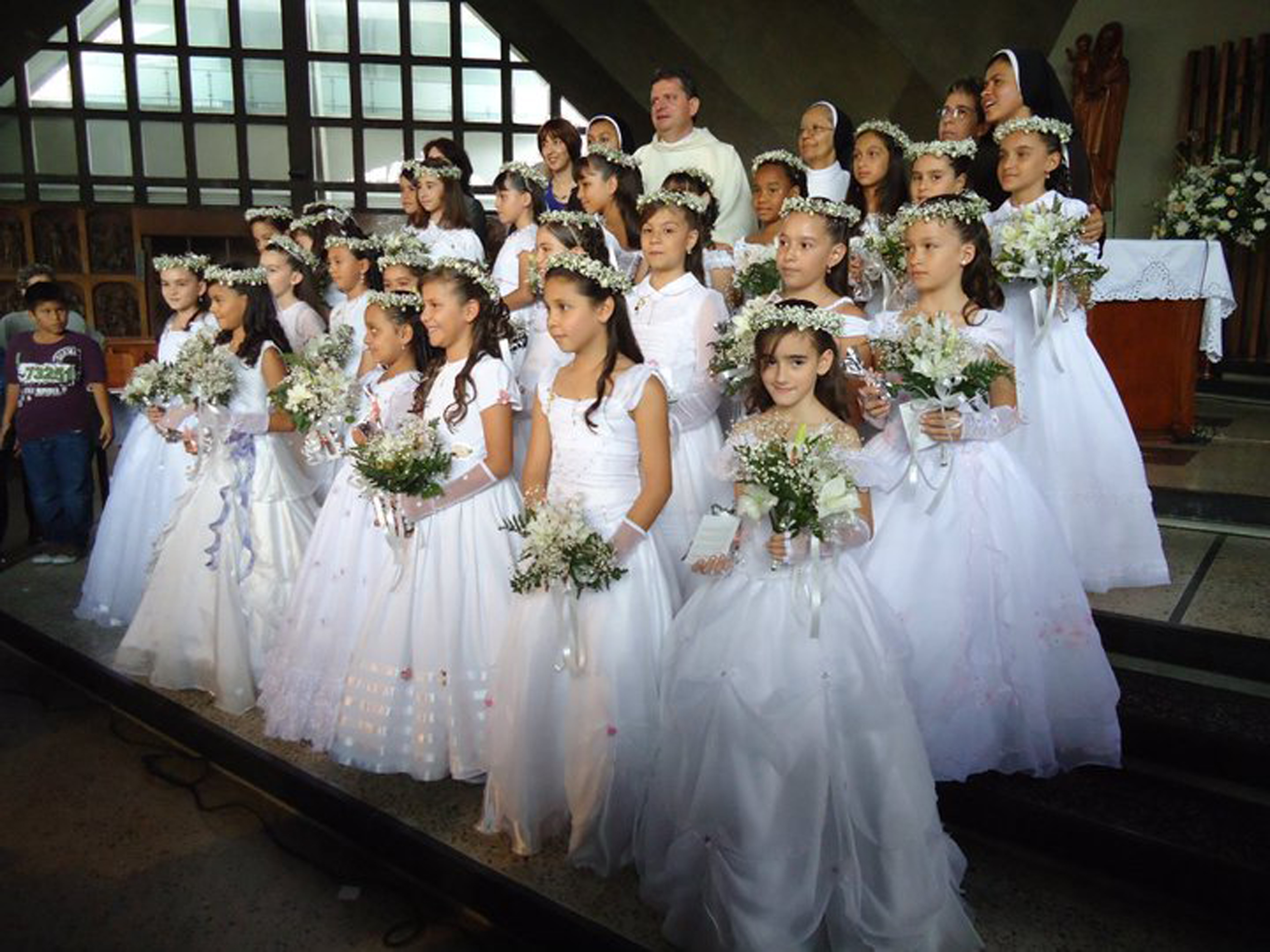 Grupo de Niñas haciendo su primera comunión en el colegio carmelitas descalsas